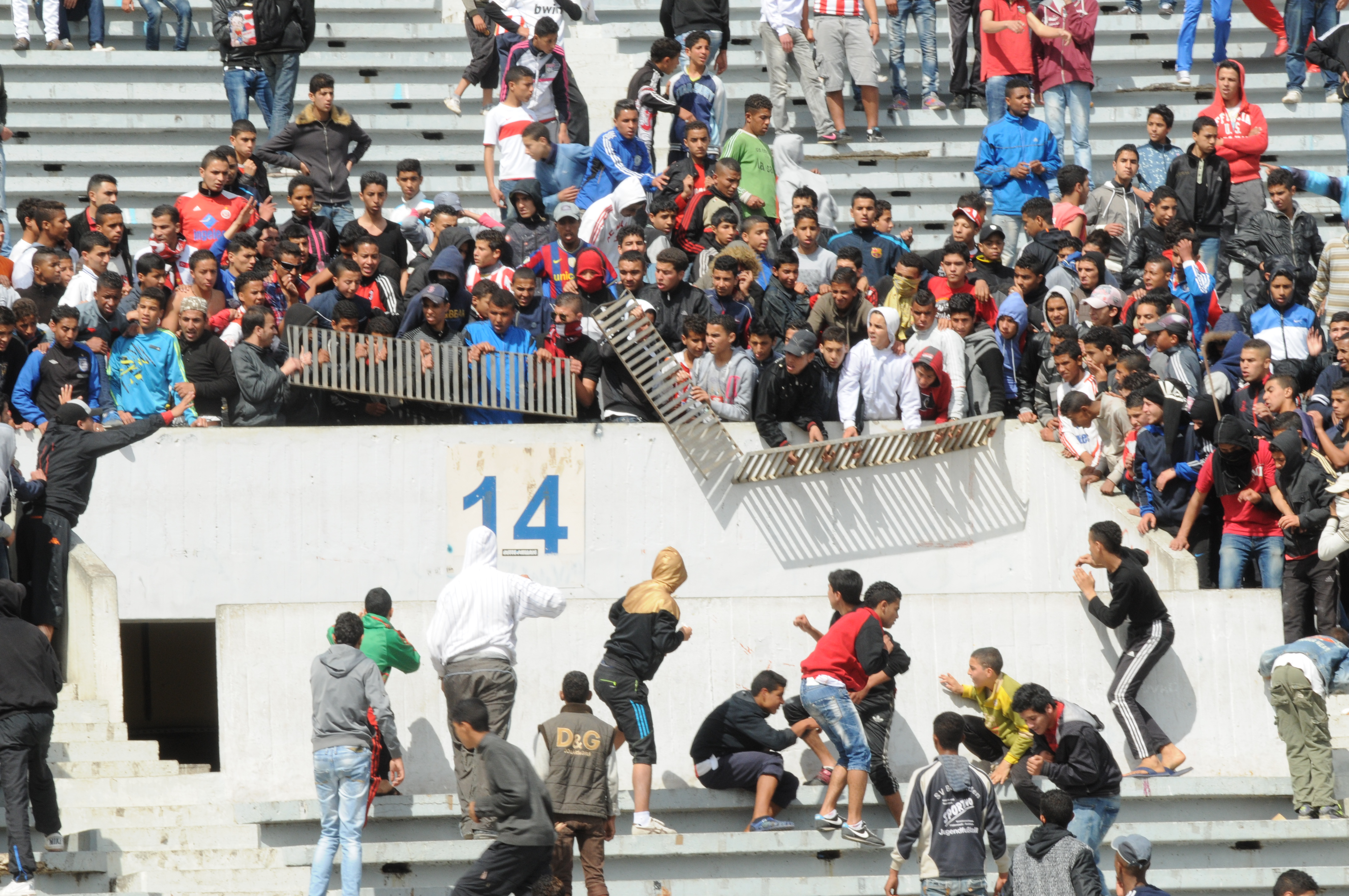 Recent sports-related violence has led to one death and scores of hospitalisations. أعمال العنف التي صاحبت المنافسات الرياضية مؤخرًا تسببت في مصرع شخص وإصابة العشرات. Les violences récentes survenues dans les stades ont fait un mort et entraîné des dizaines d'hospitalisations.